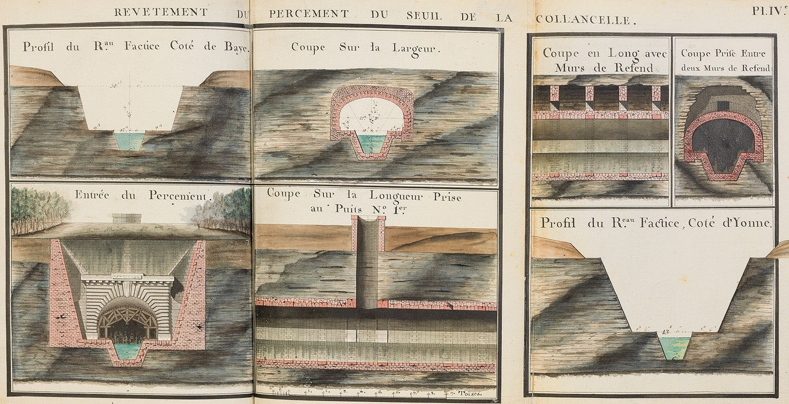 Revêtement du percement du seuil de la Collancelle Planche IV de la Description du canal du Nivernais tel qu'il a été projeté pour la navigation du Bois, suivie d'un projet économique pour son extension tendant à la faire servir au commerce en général, Aimable Hageau, 1790. Archives départementales de la Nièvre, 1 J 106.